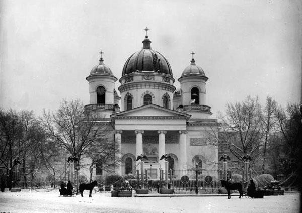 Петербургский Спасо-Преображенский собор до революции